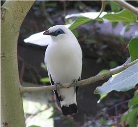 Bali-spreeuw / Leucopsar rothschildi . Eigen foto Categorie:Afbeelding vogel